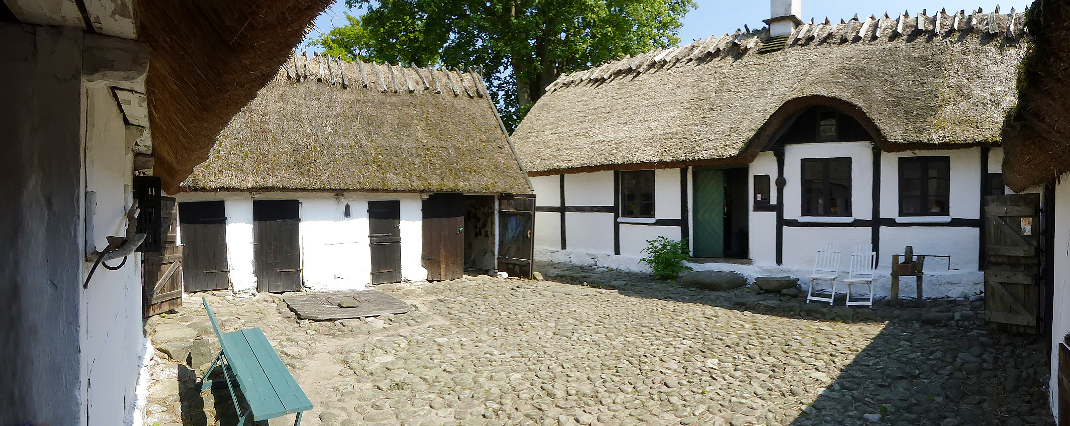 Byagården i Tomelilla, Skåne.